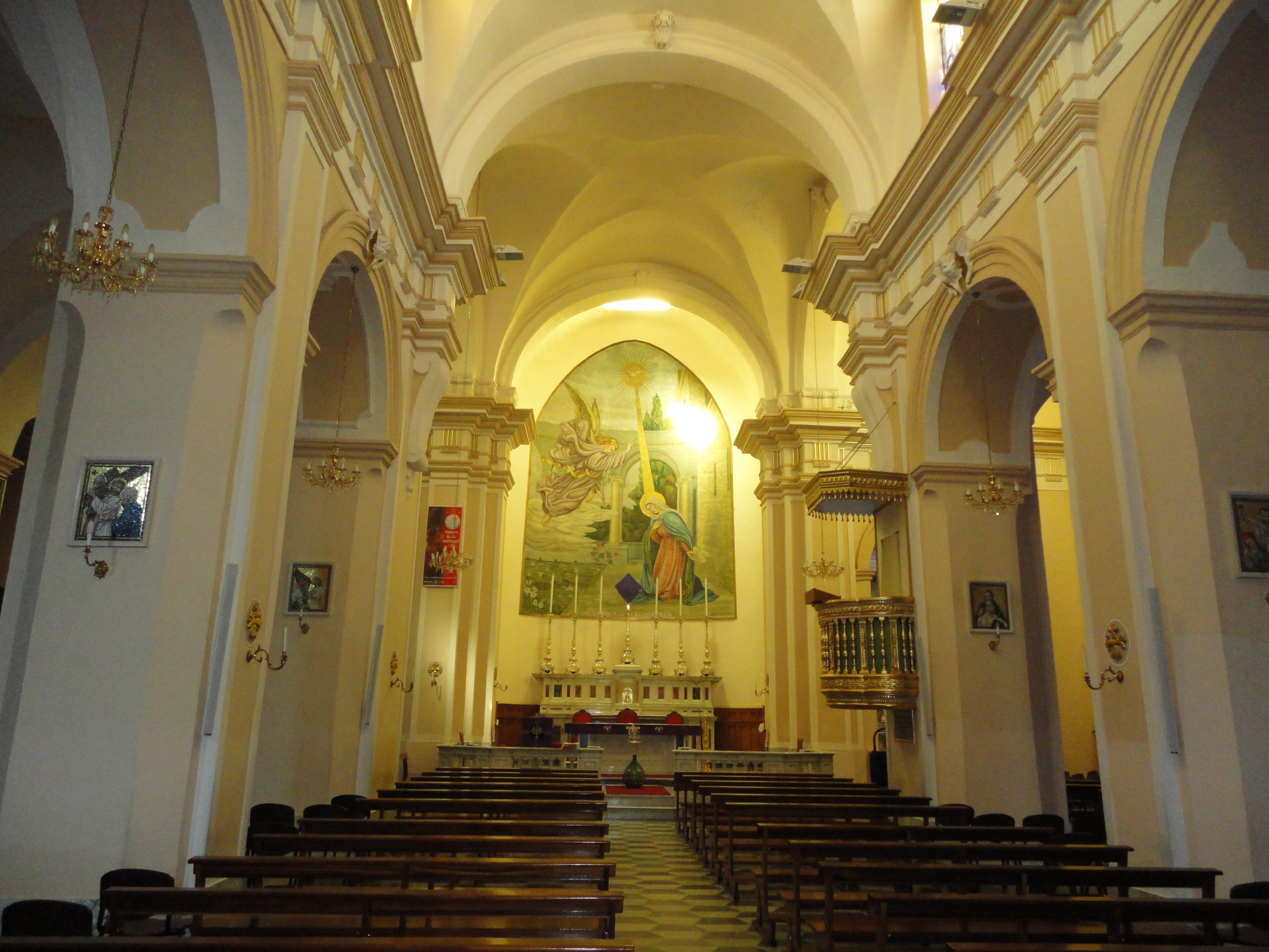 Interno Chiesa Madre di Tuglie, Lecce